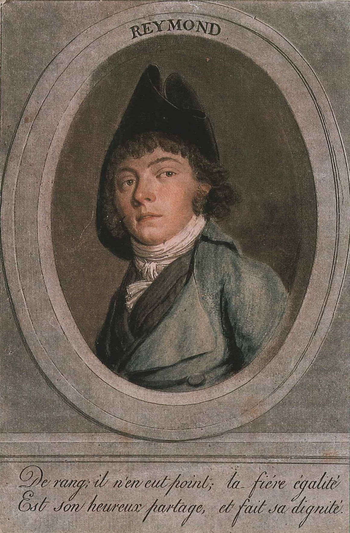 Louis Reymond (1762-1821), Jakobiner und Anführer der Bourla-Papey während der Waadtländer Steuerrevolte im Jahr 1802. Kolorierter Stich von Benjamin Bolomey (1739-1819), Musée historique de Lausanne. Text: Vornehme Herkunft erhielt er nicht, die stolze Idee der Gleichheit ist sein glückhafter Erbteil und macht seine Würde aus.